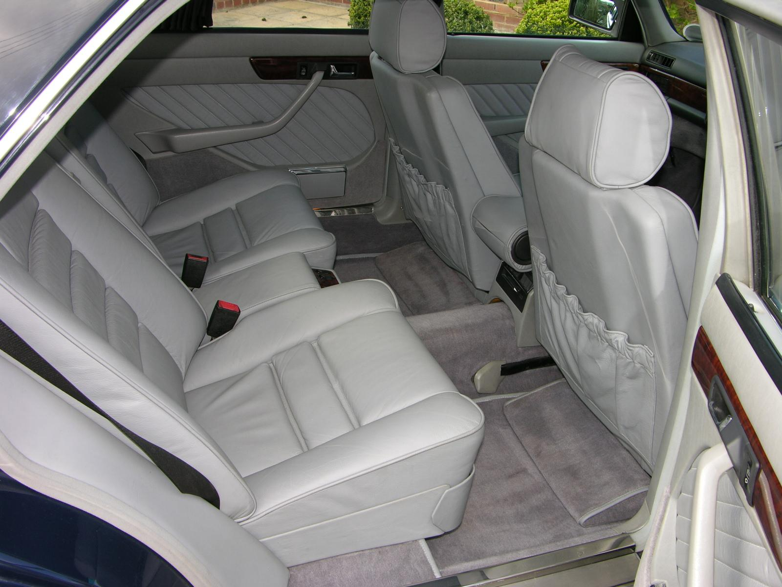 Mercedes Benz 420SEL